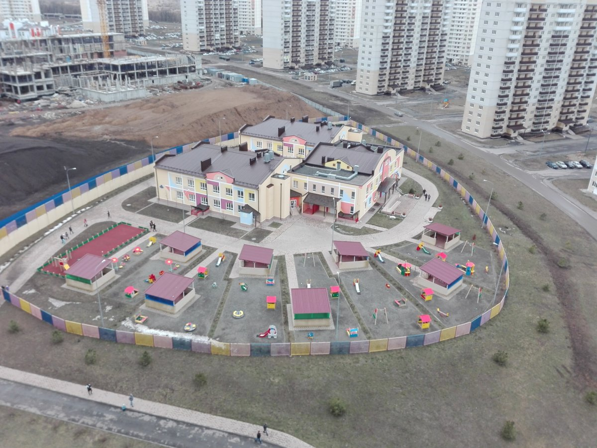 Вид на детский сад №37 по адресу г. Ростов-на-Дону, б. Измайловский, 2 в ЖК Суворовском.